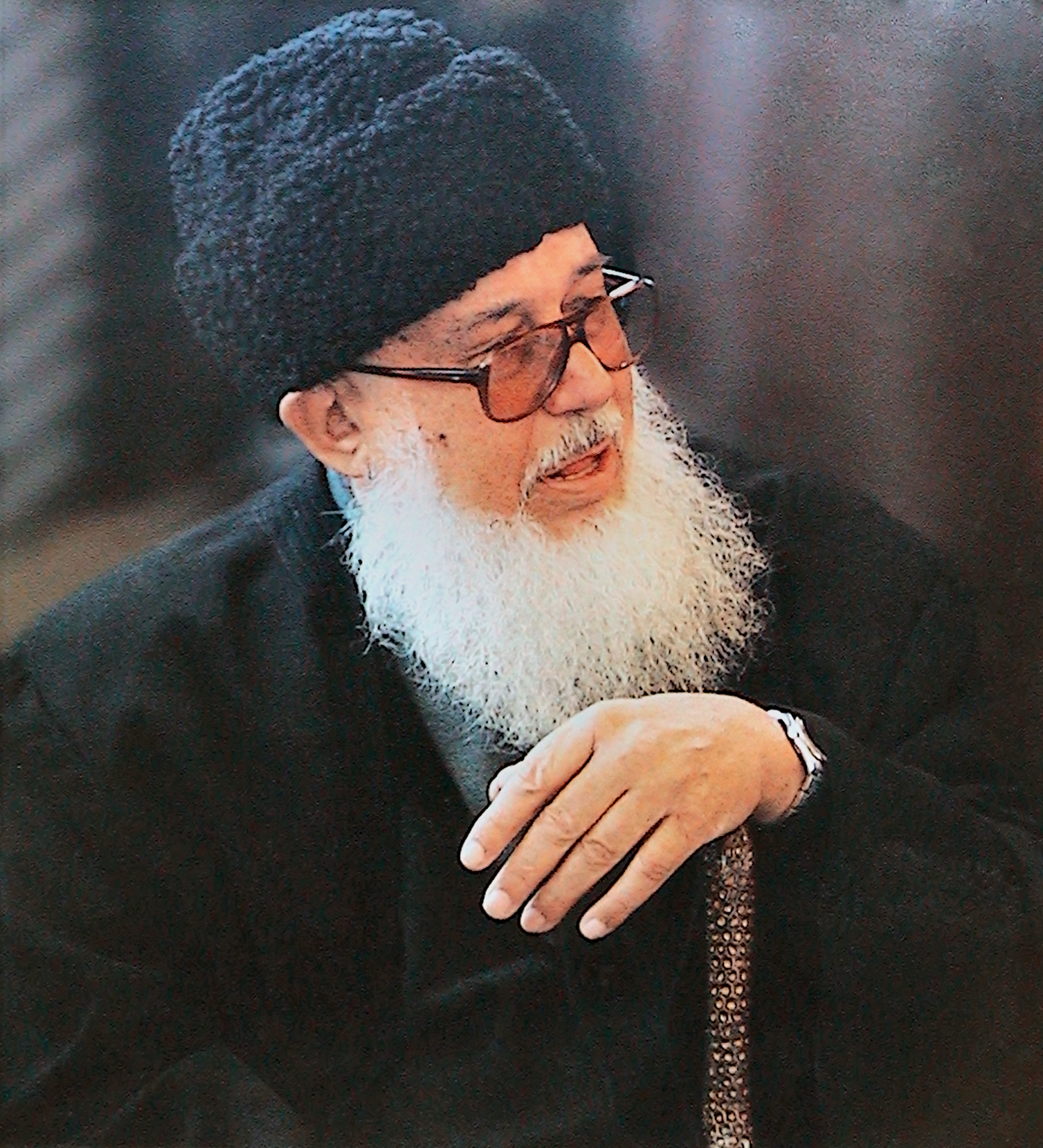 KENDİMİZDE OLAN RESİM